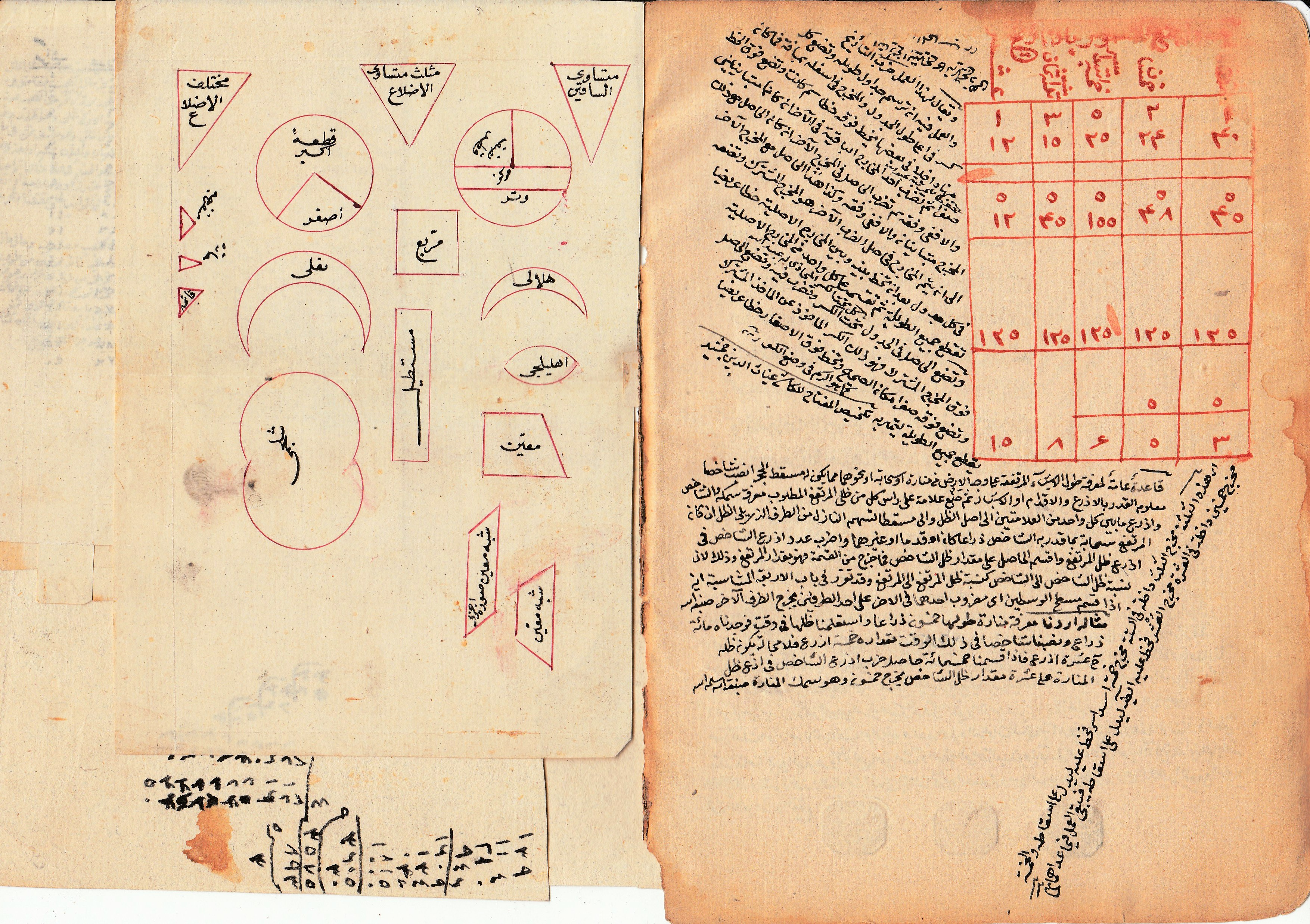 الصفحة 51 من كتاب خلاصة الحساب من تأليف بهاء الدين العاملي (المتوفى عام 1035 هجرية) ونسخ المخطوط في عام 1165 هجري/1751م، ولقد اشترى المخطوط واقتناه الشيخ قاسم أفندي المفتي عام 1270 هجري/ 1853م، ويوجد على غلاف الكتاب ختم ملا قاسم مع ختم الناسخ للمخطوط، ثم قرأ الملا قاسم الكتاب على شيخه أبو الهدى عيسى البندنيجي الذي يوجد ختمه وكتابته في آخر صفحة في المخطوط عام 1271هجري /1854م، وعيسى البندنيجي هو المدرس في المدرسة الداودية ببغداد